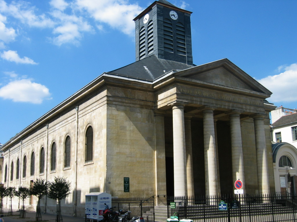 Eglise Saint Pierre-du-gros-caillou Paris VII